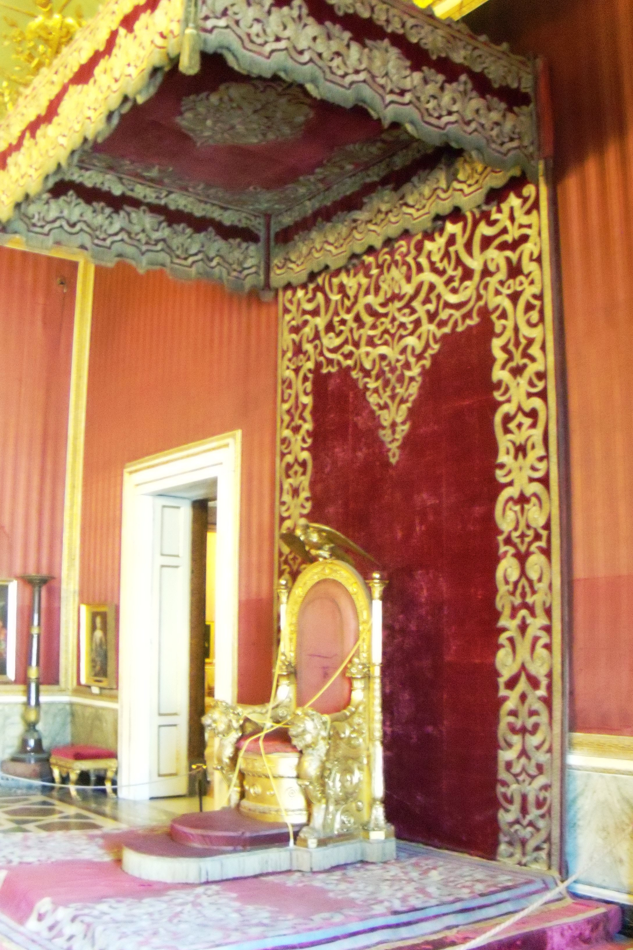 Particolare del Trono all'interno del Palazzo Reale di Napoli.